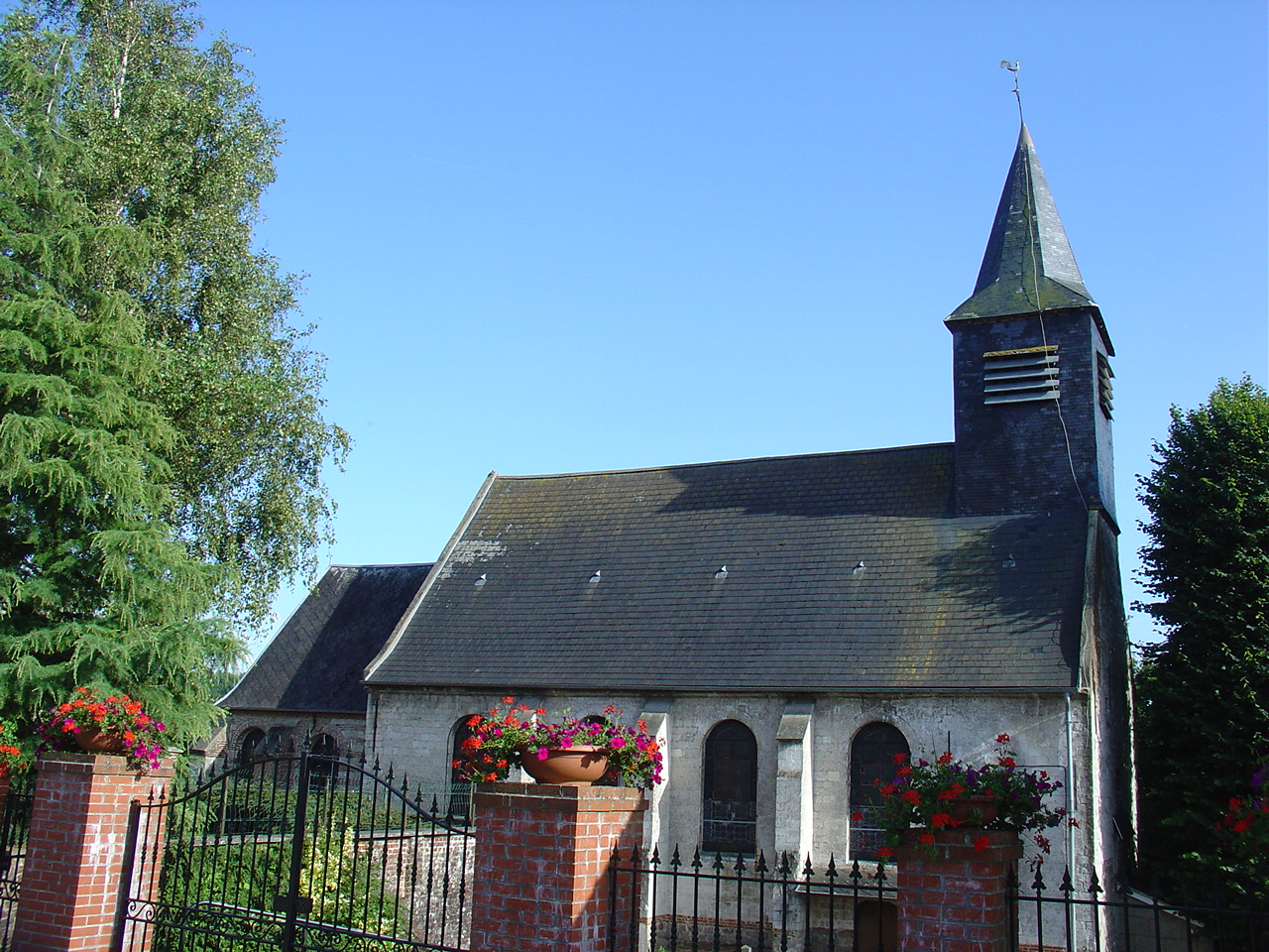 Église de Diéval